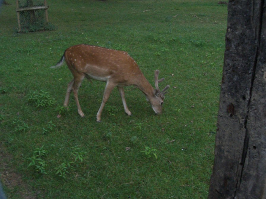 Junger Damhirsch (Dama dama) im Wildtiergehege im Bend, Grevenbroich